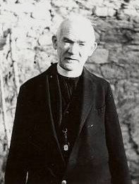 Josef Štemberka (1869 – 1942), Český katolický kněz.